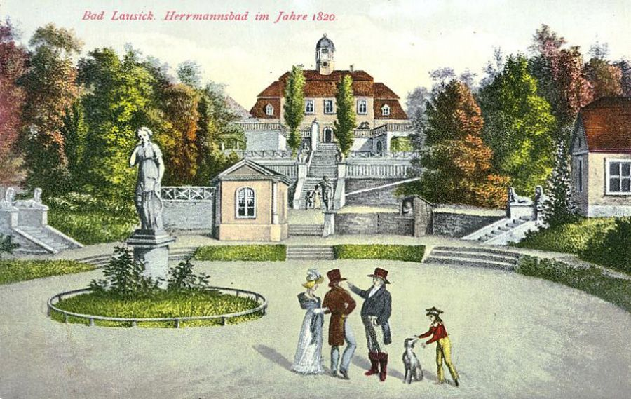 Das Herrmannsbad in Bad Lausick im Jahr 1820 (Postkarte nach 1913)